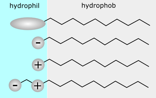 Tenside haben hyrophile und hydrophobe Enden